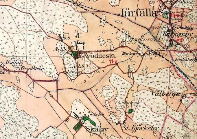 Veddesta, Skälby, Järfälla på Häradsekonomiska kartan